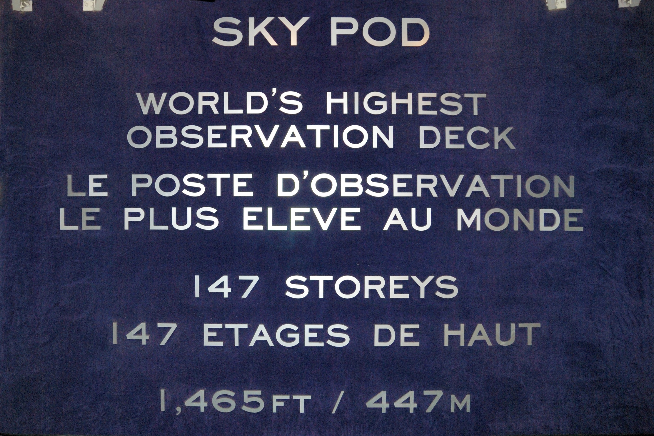 CN Tower, Toronto: Hinweisschild zum Sky Pod